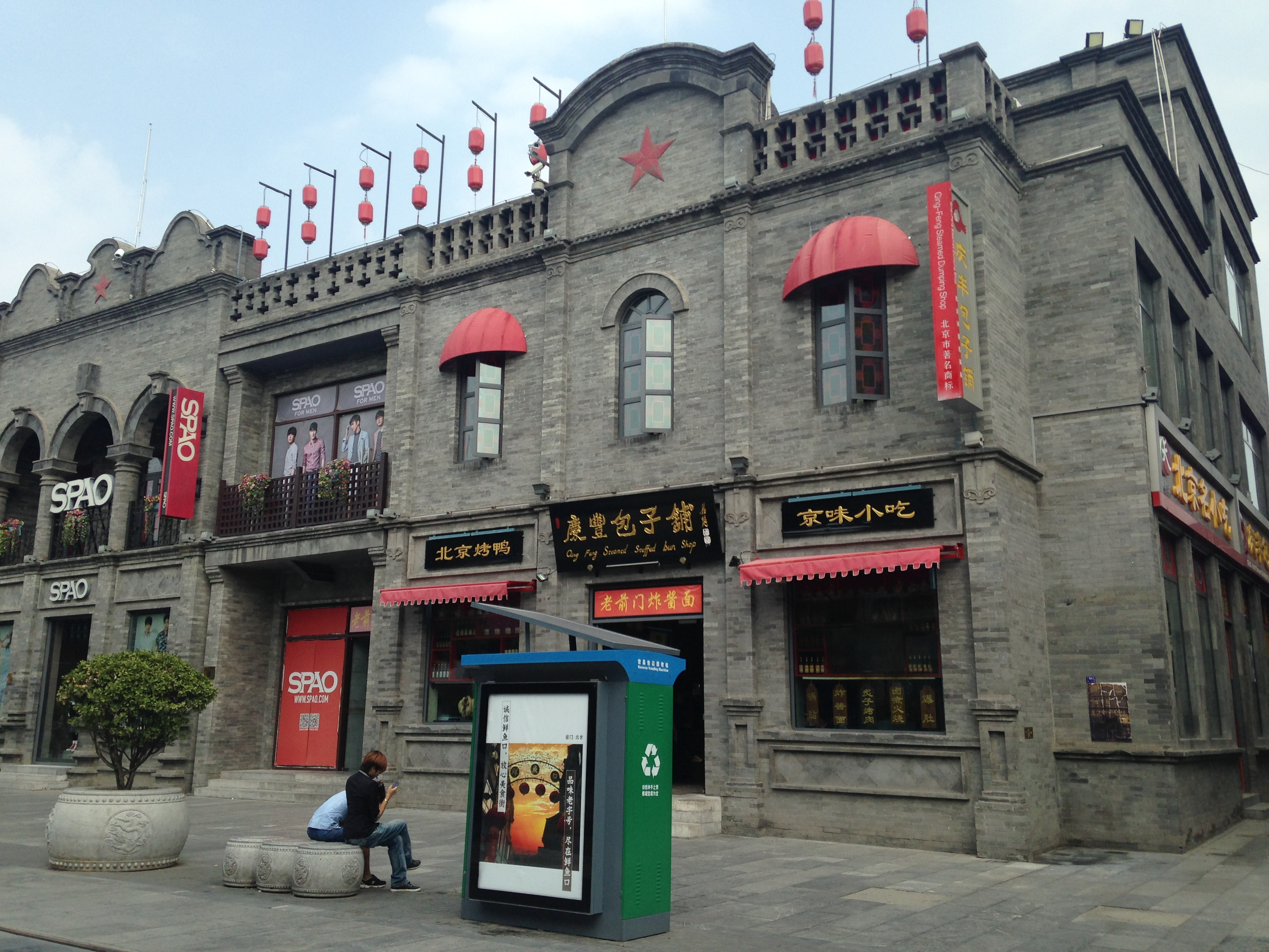 前門大街にある慶豊包子店